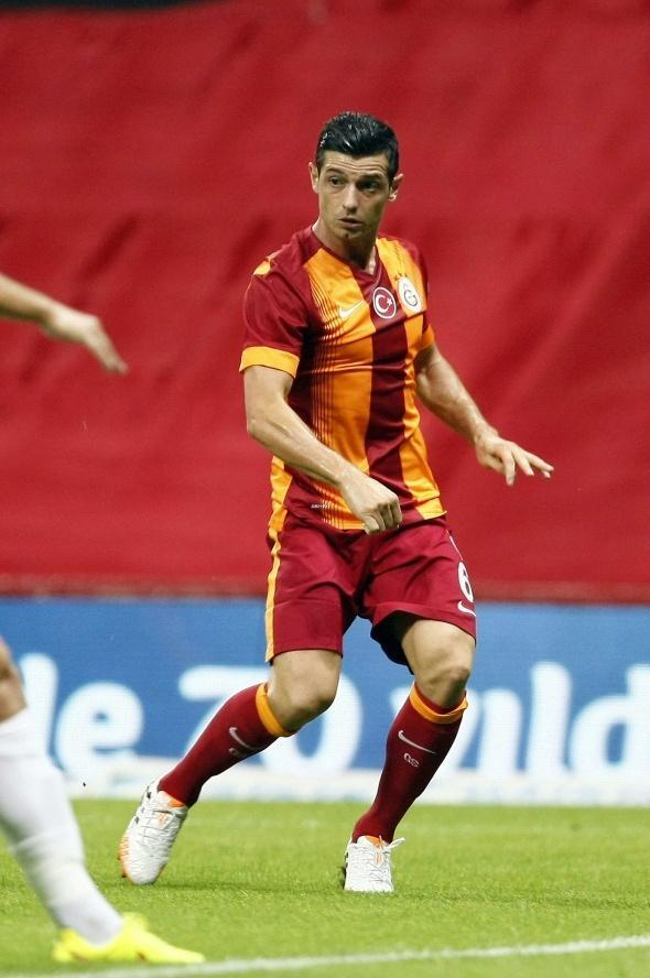 Galatasaray'ın yeni transferi Blerim Xhemaili Eskişehirspor müsabakasında ilk 11'de görev yaptı.